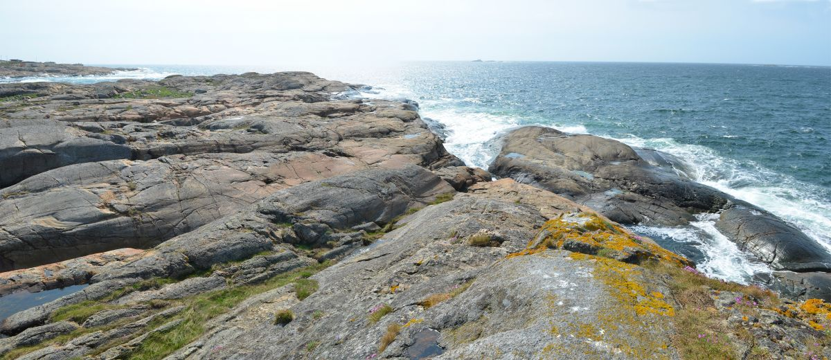 Kinnhalvøya møter Skagerrak med blankskurte svaberg og karrig vegetasjon.